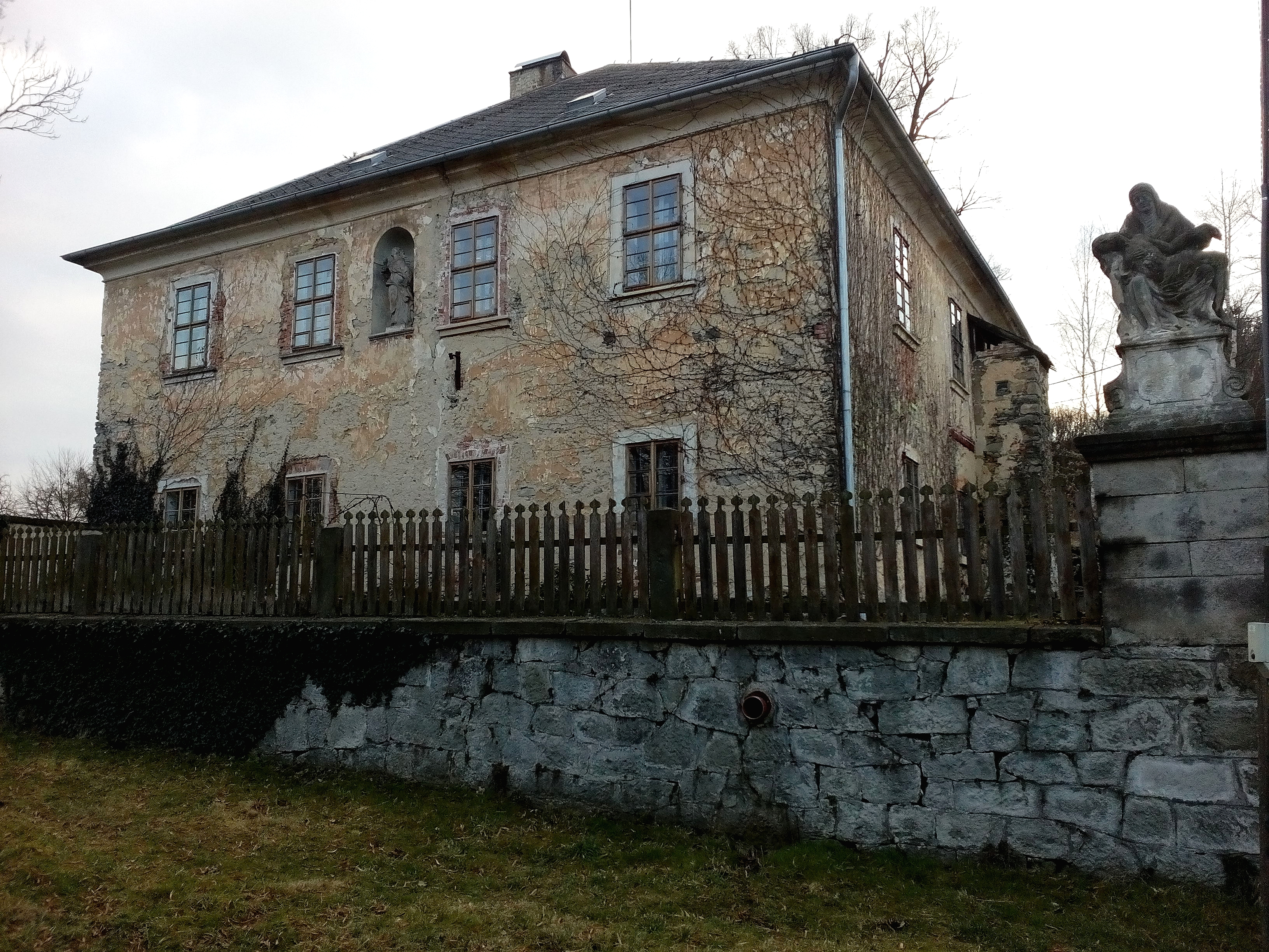 Barokní budova bývalé fary z roku 1704.